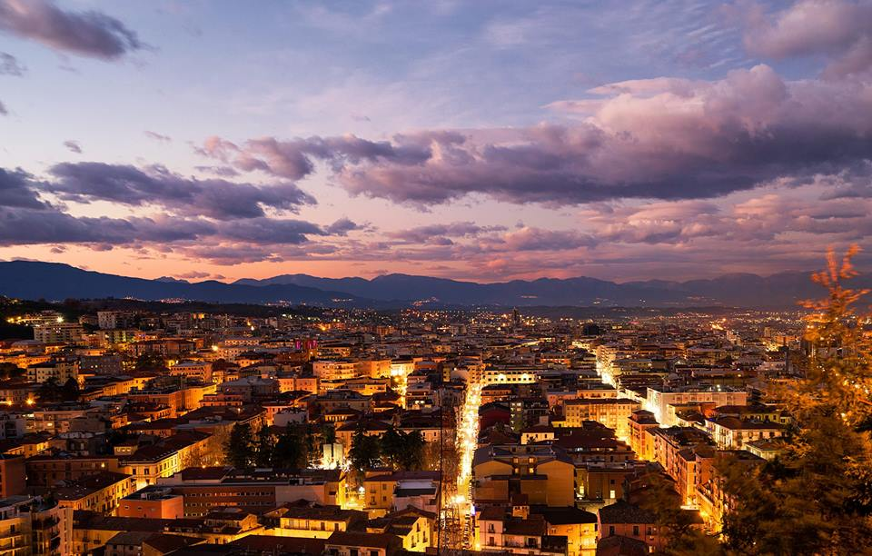 Cosenza nuova vista dal centro storico al tramonto